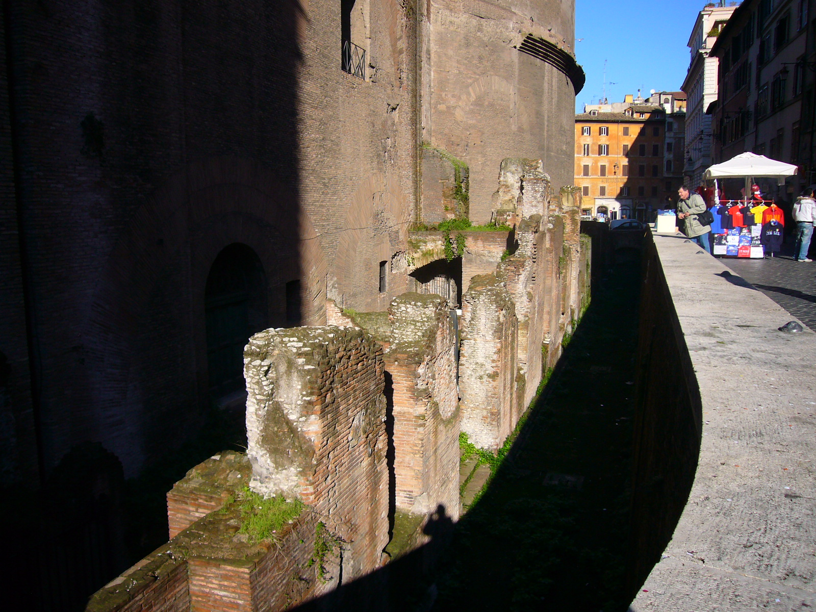 Roma, muro dei Saepta Iulia a fianco del Pantheon